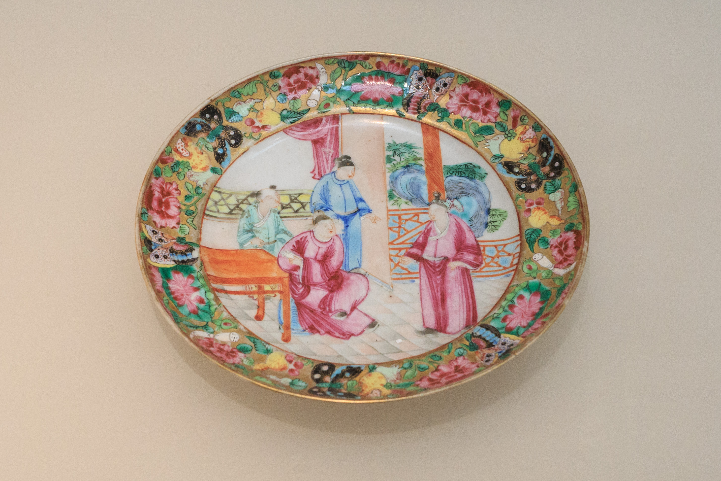 广东省博物馆藏品—— 广彩人物图碟，清道光